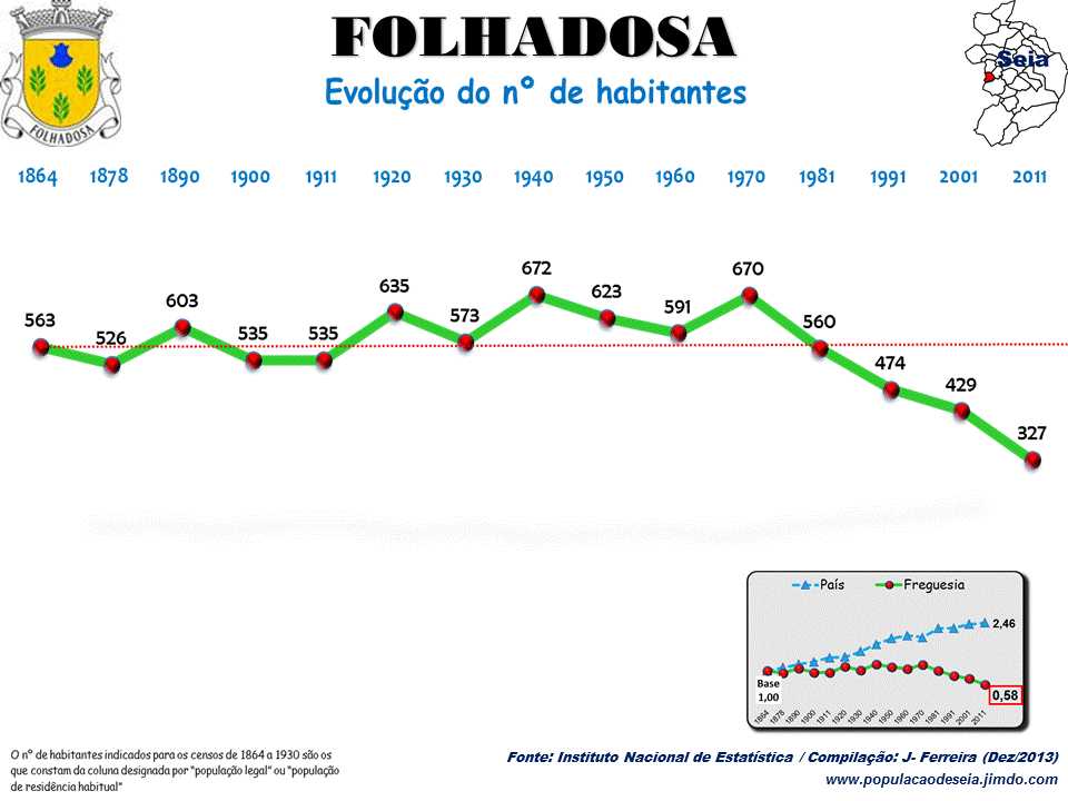 Evolução da População 1864 / 2011